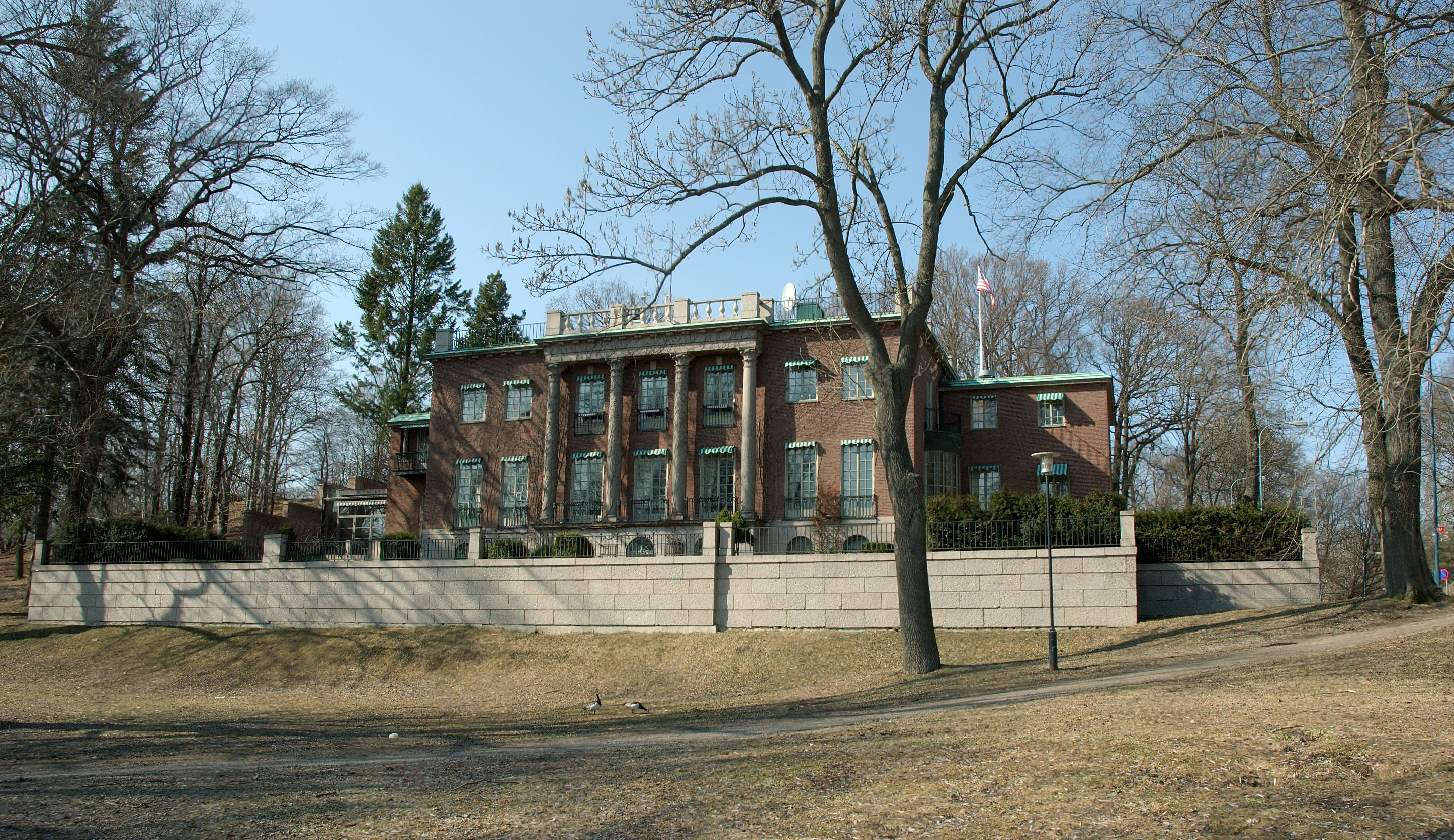 Residence dos Estados Unidos em Estocolmo.